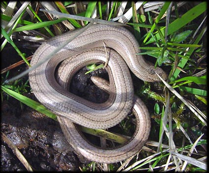 Orvet photographié sur le Plateau d'helfaut (réserve naturelle régionale) dans le nord de la France, près de Saint Omer.